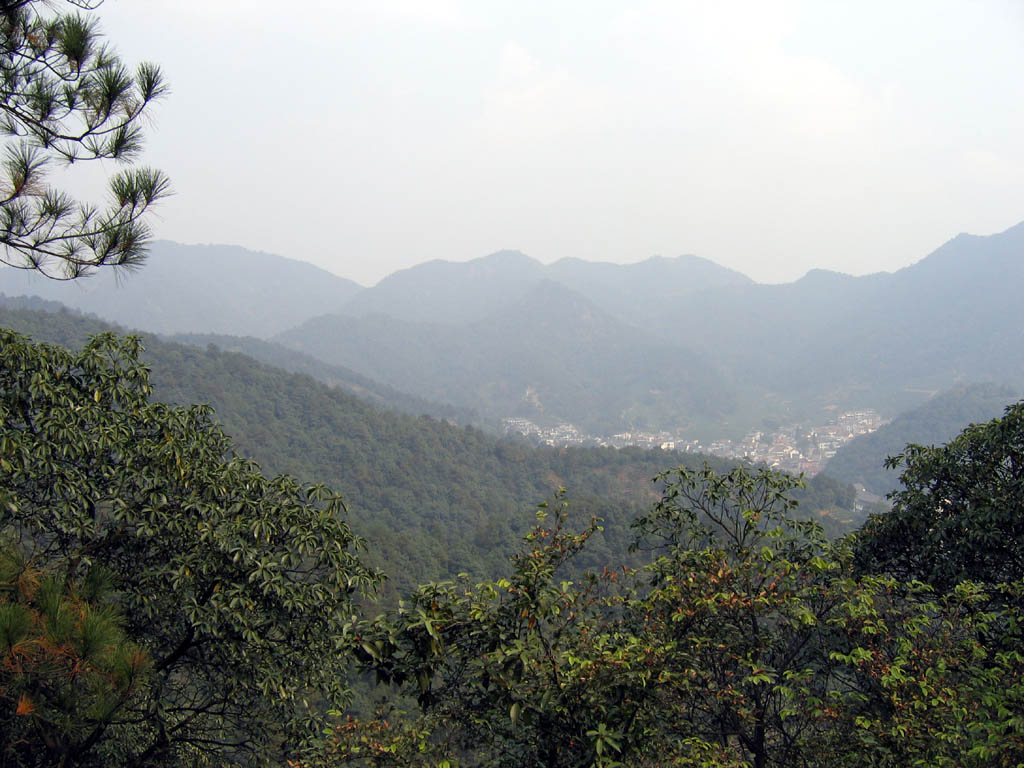 Hangzhou, China